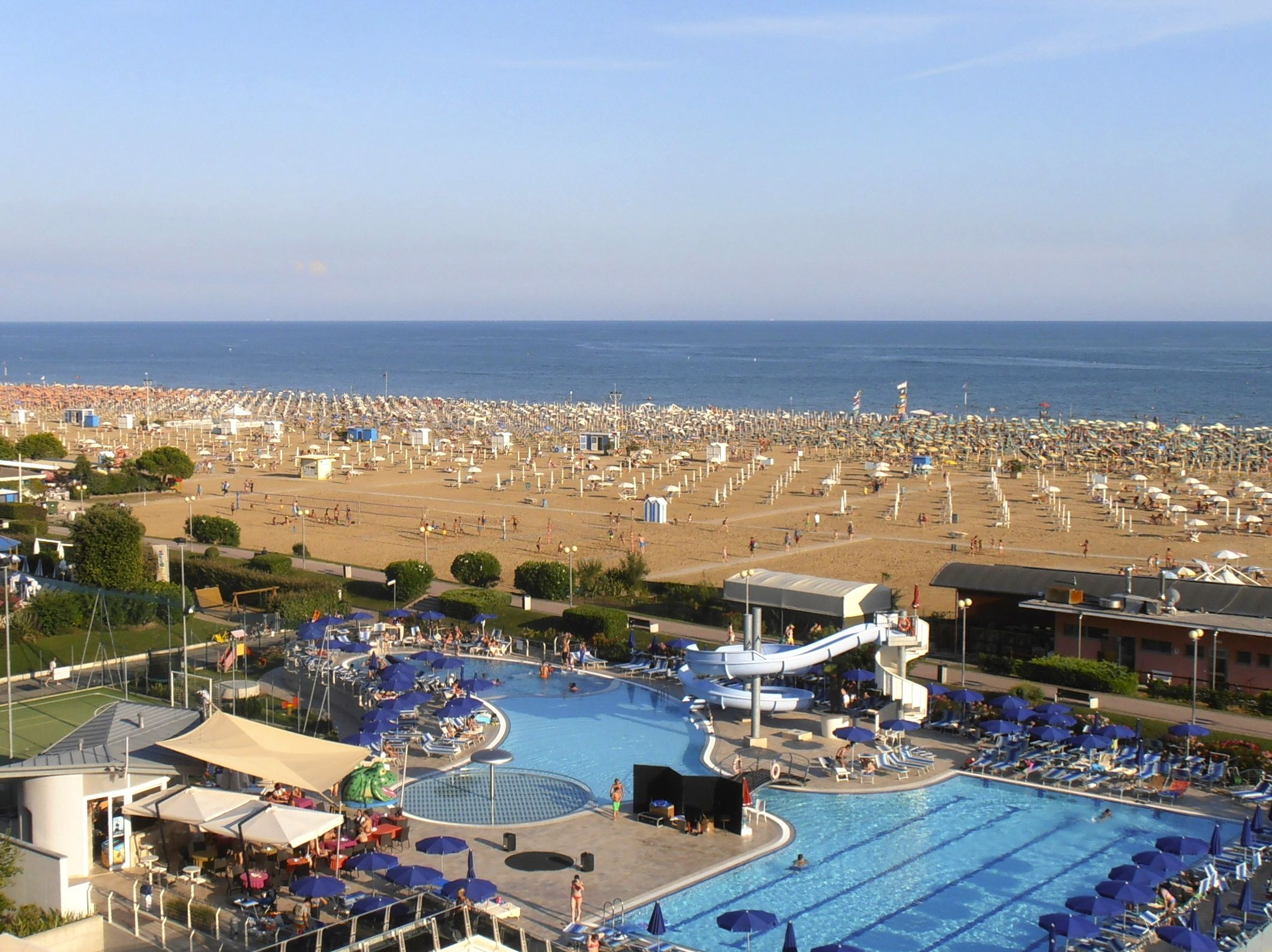 Italy - Bibione - La spiaggia 25-07-2014